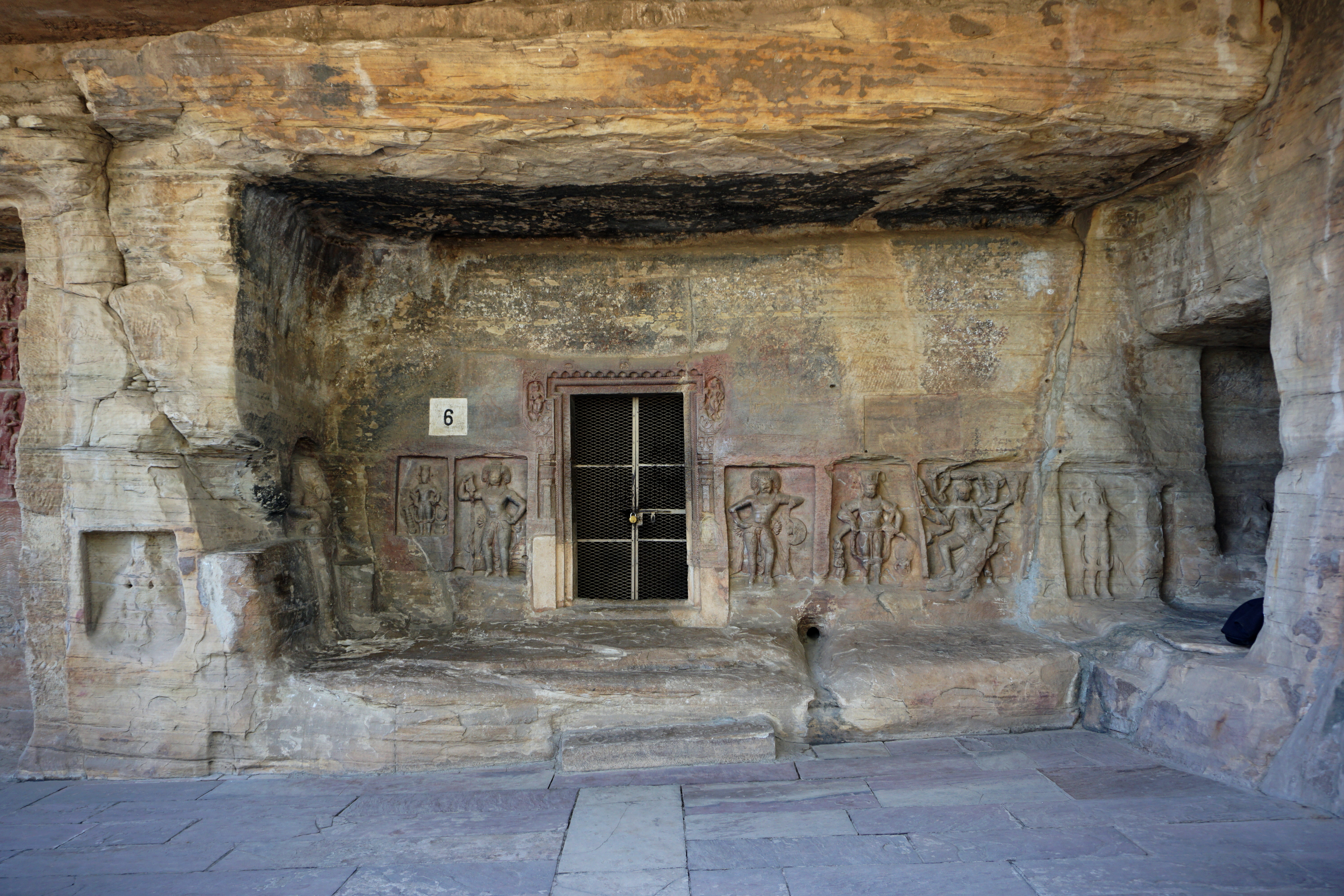 Udayagiri Caves, Vidisha, India